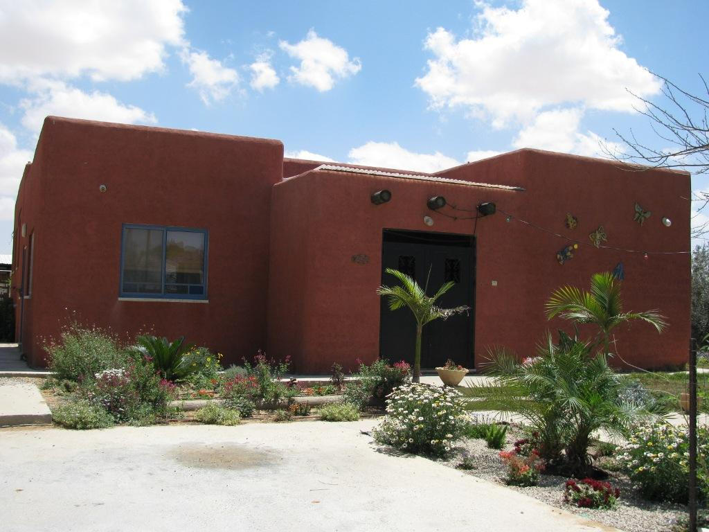 צבע המבנה החום החם, מתאים מאוד למדבר והגינה המטופחת בולטת על רקע הצבע הזה